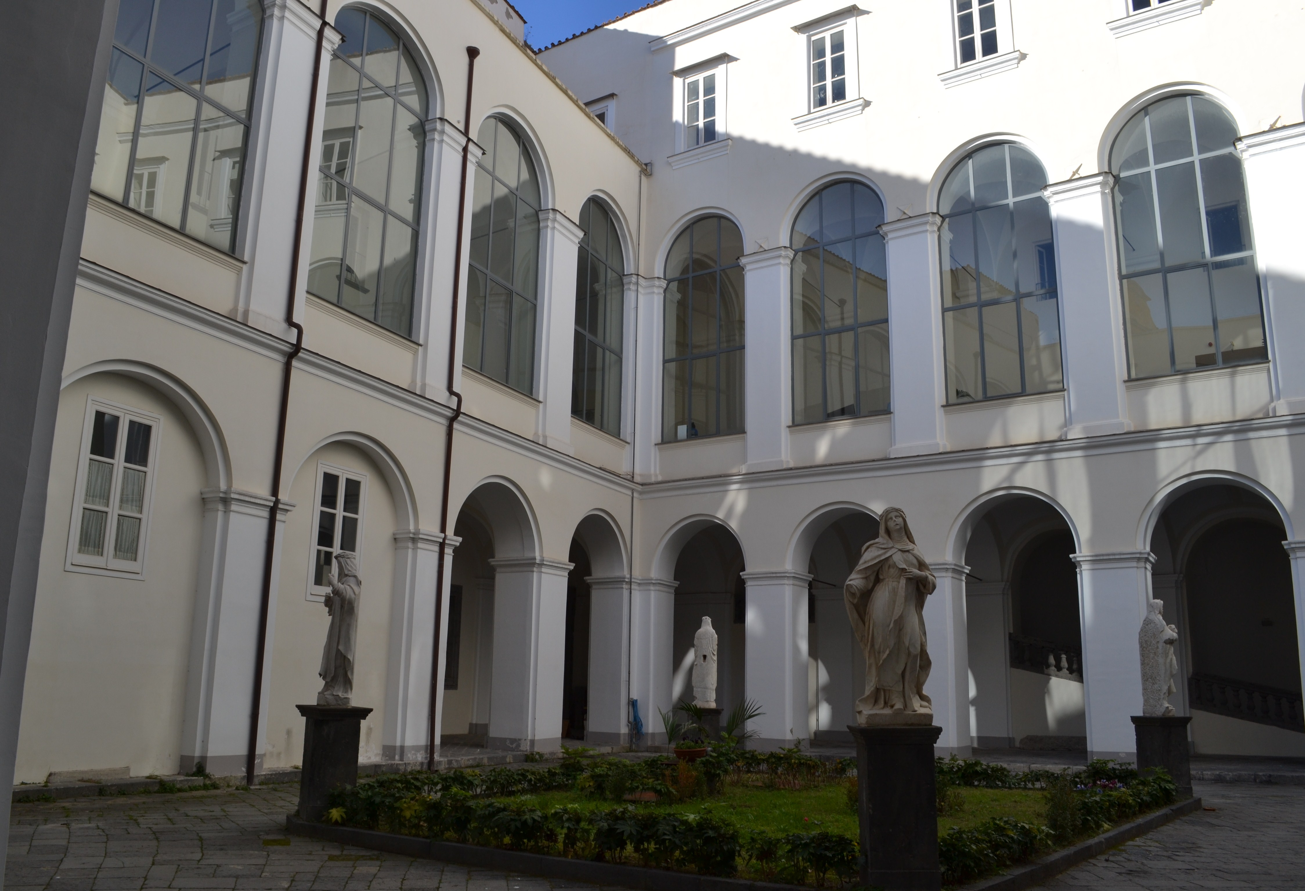 Chiesa di San Domenico Maggiore di Napoli - Chiostro piccolo (o delle statue)